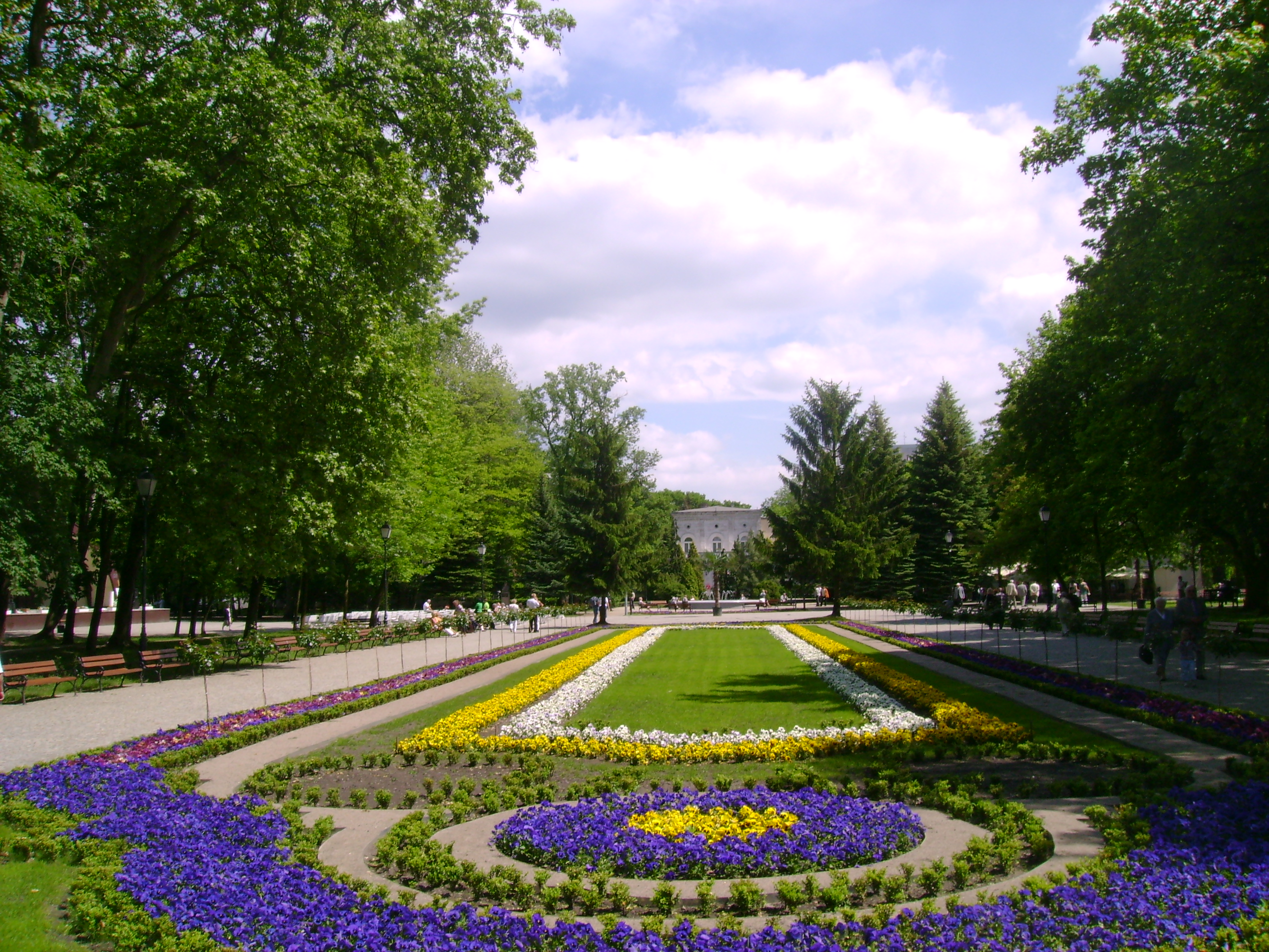 Dywany Kwiatowe w Solankach.